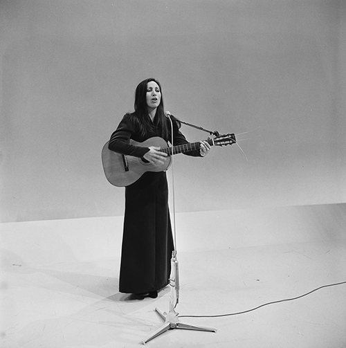 Julie Felix in het televisieprogramma Fanclub